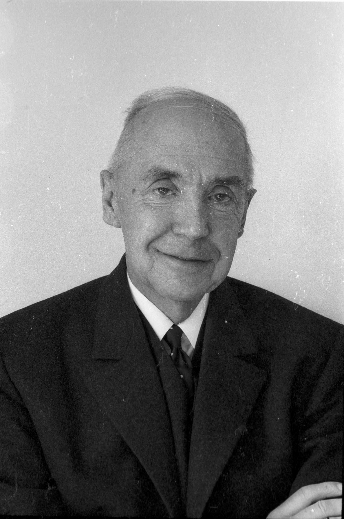 Dr. Hans Müthling. SPD-Bundestagsabgeordneter für den Wahlkreis Kiel